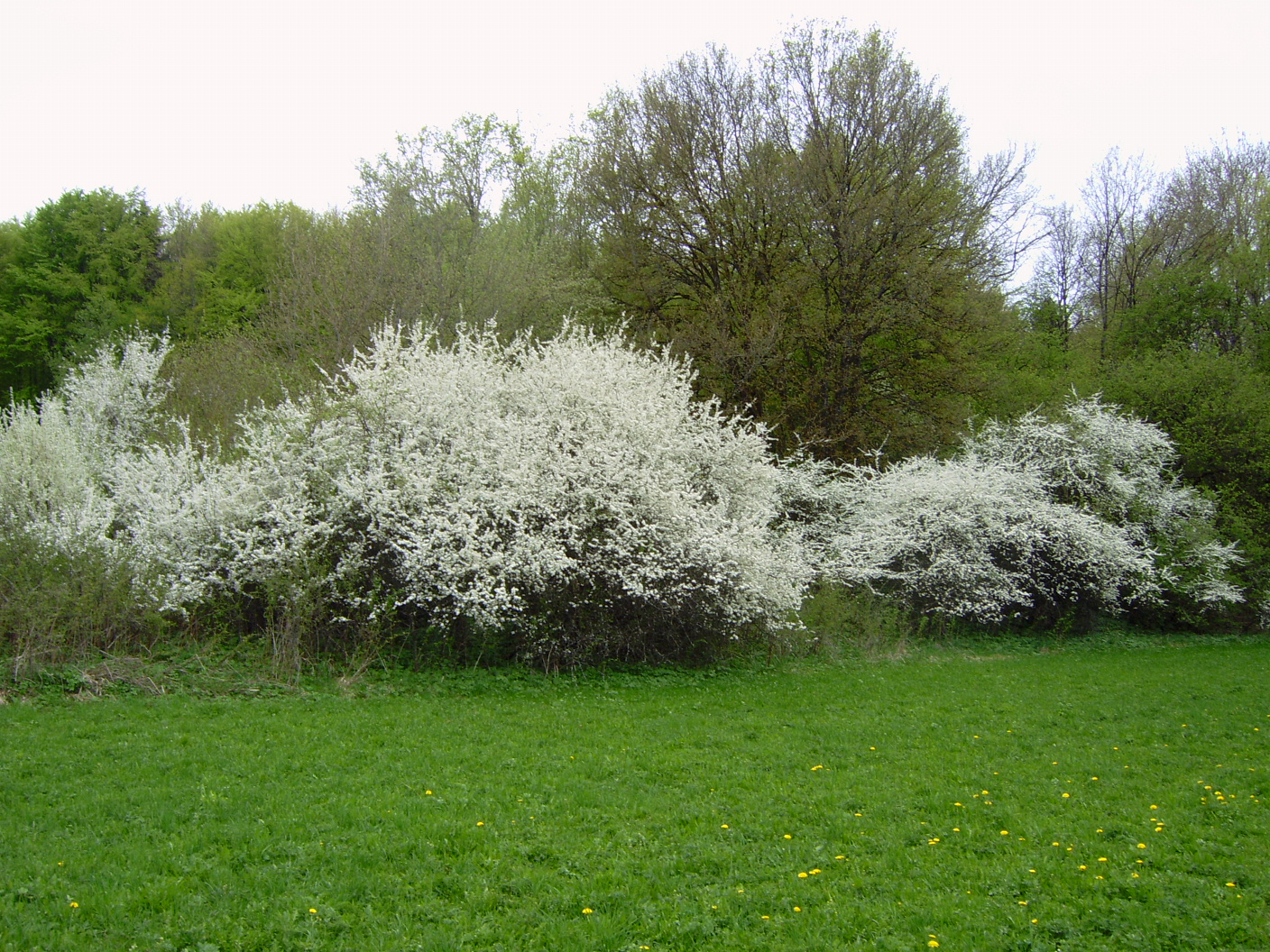 Schlehenblüte (Prunus spinosa) 2009 auf der Schwäbischen Alb